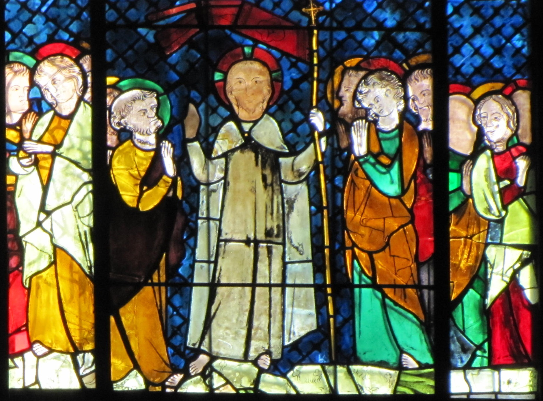 Alsace, Bas-Rhin, Cathédrale Notre-Dame de Strasbourg (PA00085015).Bas-côté sud, Verrière "Résurrection du Christ" (4eBc): Jésus apparaît aux disciples